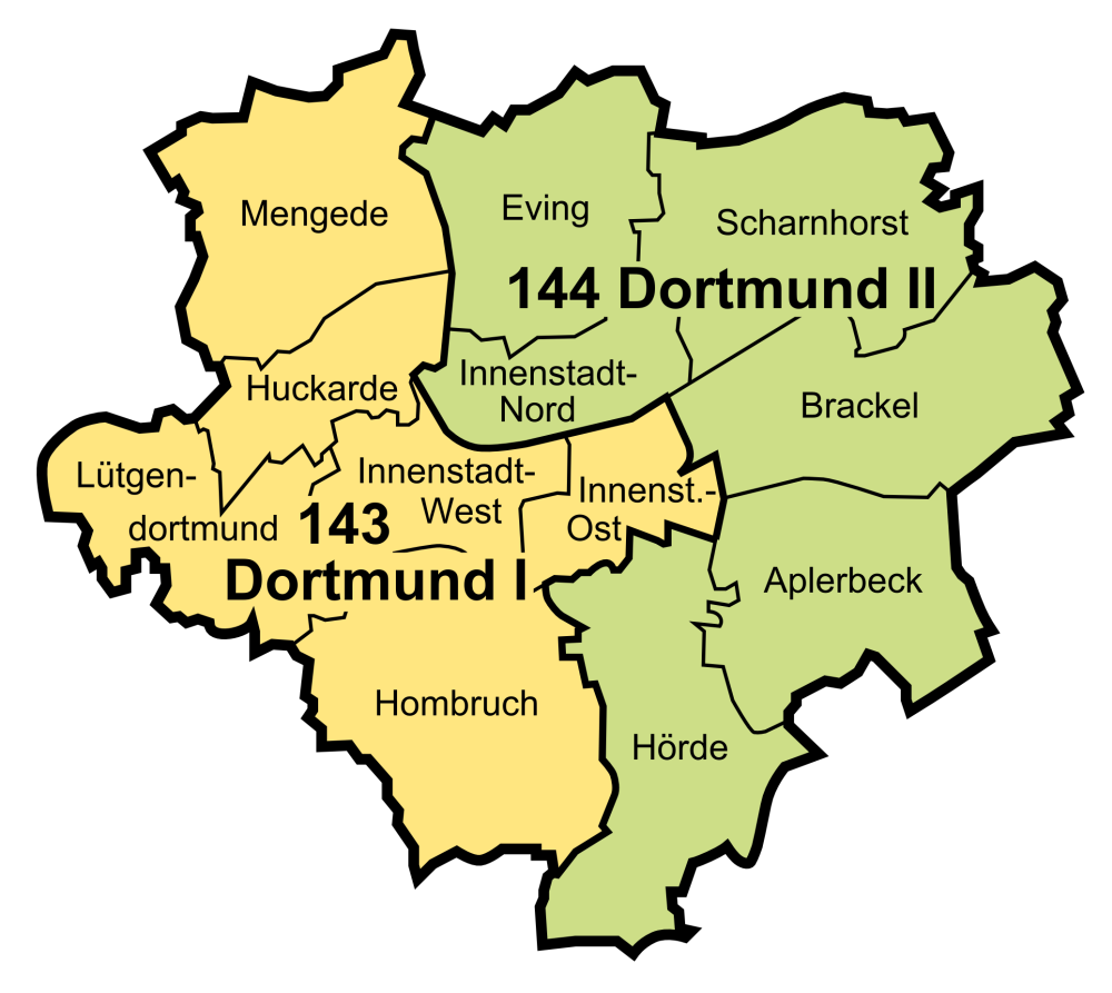 Wahlkreise in Dortmund bei Bundestagswahlen, sowie Bezirke